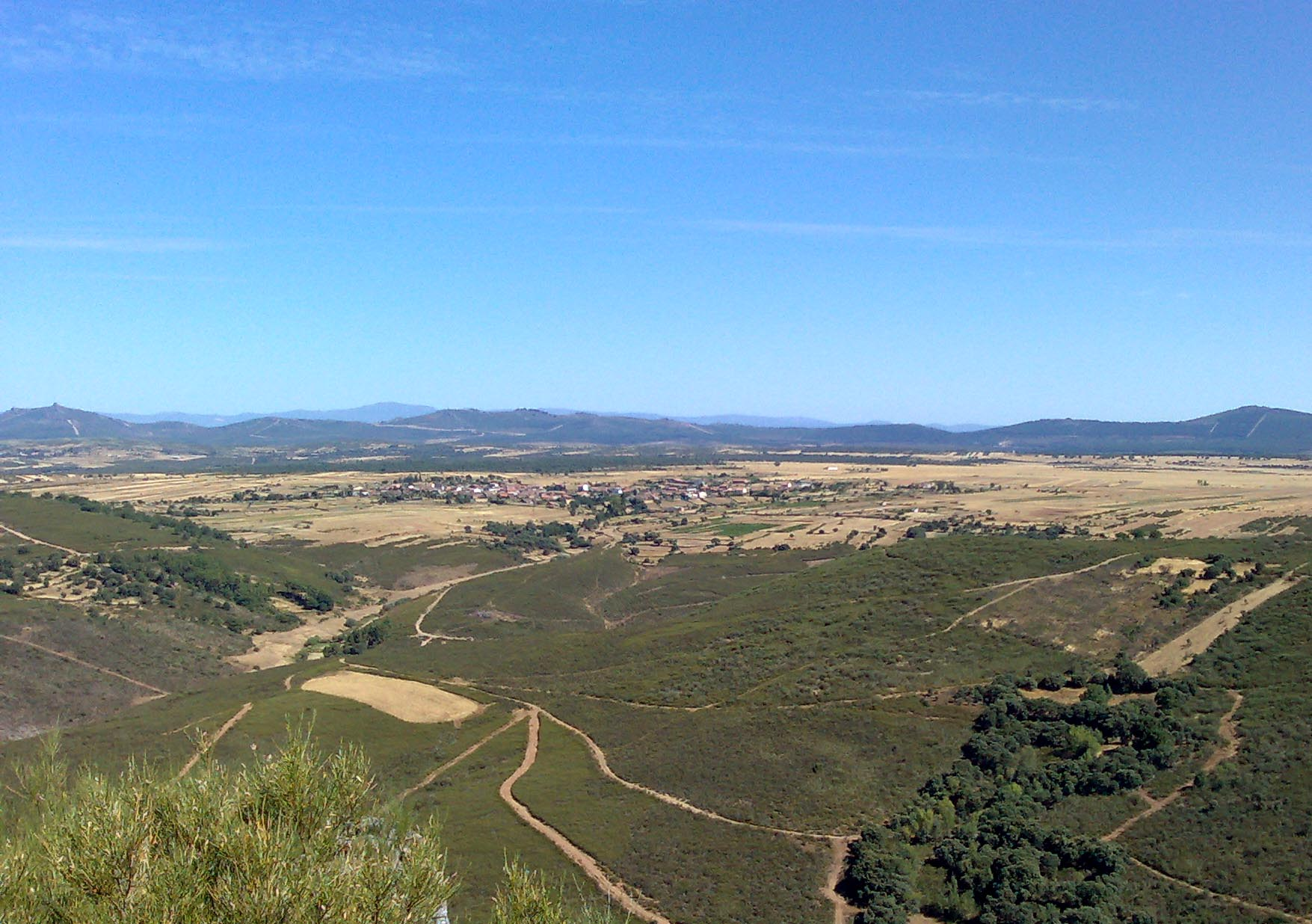 Vista panorámica de Gallegos del Campo desde la Casa Mazada, al fondo Peña Mira y la Sierra de la Culebra.